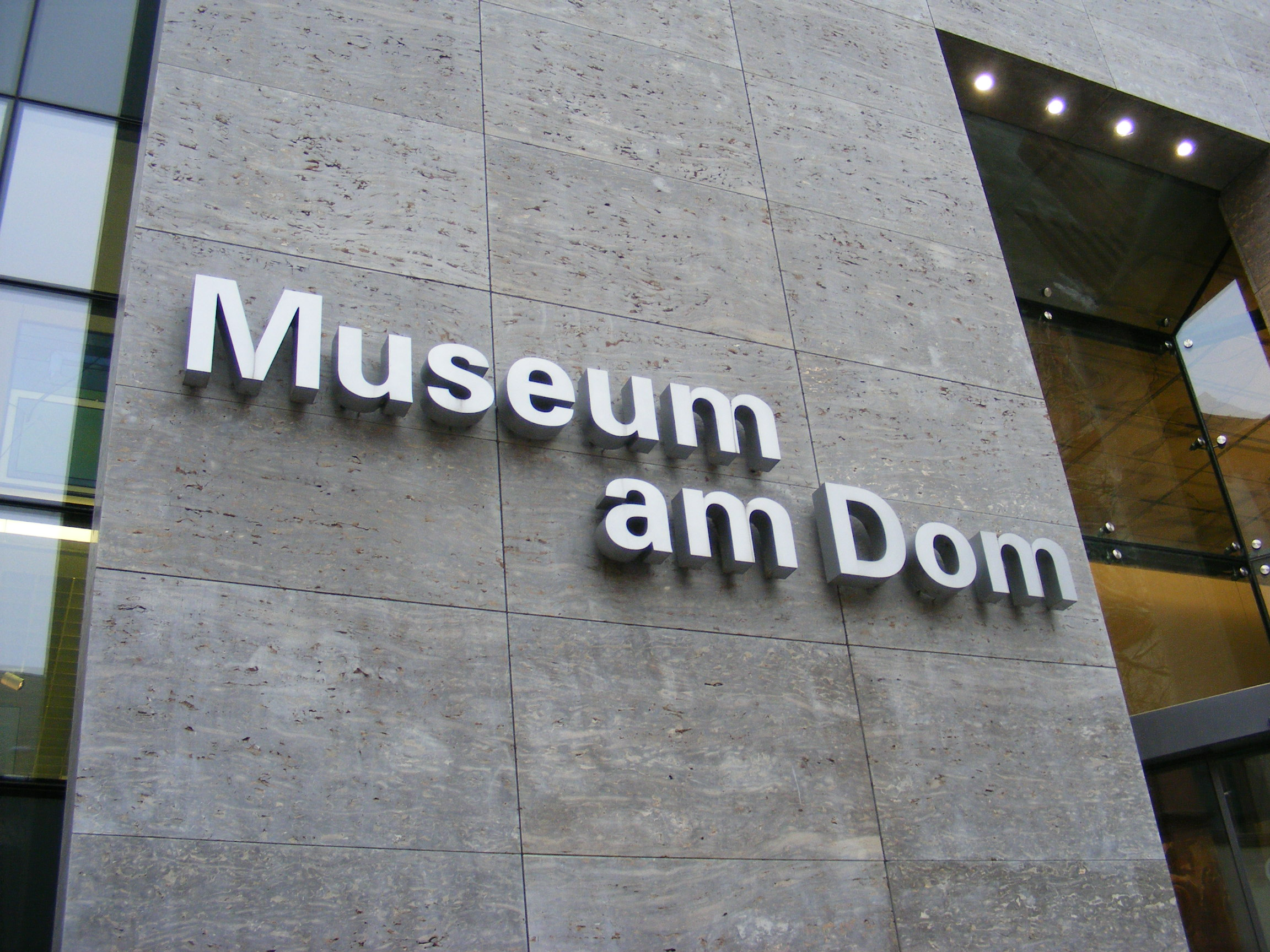 Museum am Dom, Kilianshaus (Diözese Würzburg).